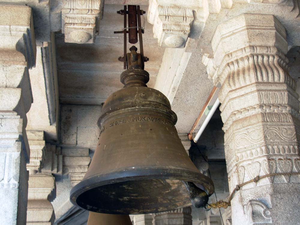 കൊല്ലൂർ മൂകാംബിക ക്ഷേത്രത്തിൽ നിന്ന്